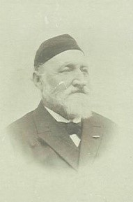 Føroyskt: Johan Christian Djurhuus (1834–1918), "Faktorin", í Klaksvík.